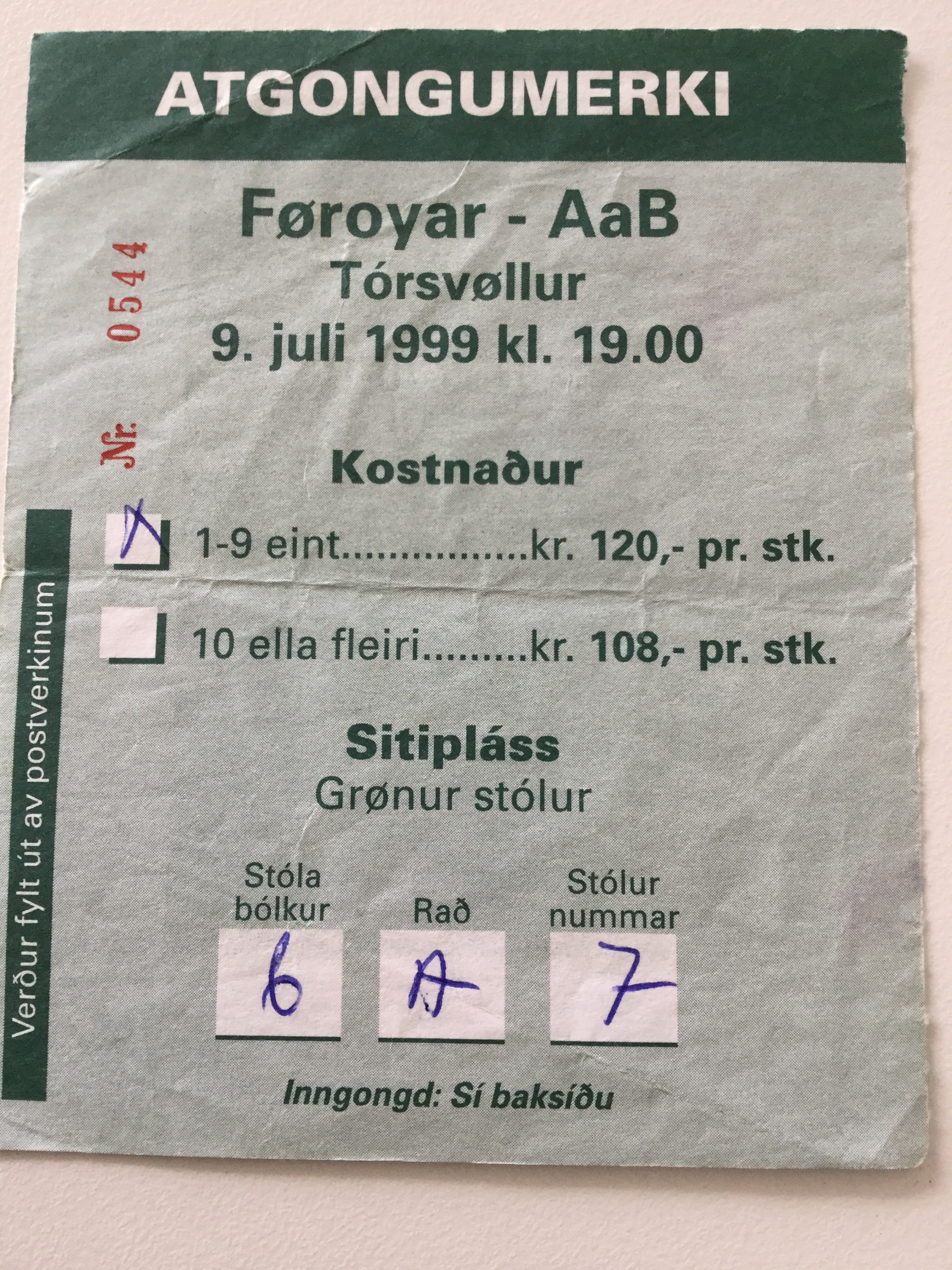 Billet fra den aller første kamp i 1999.